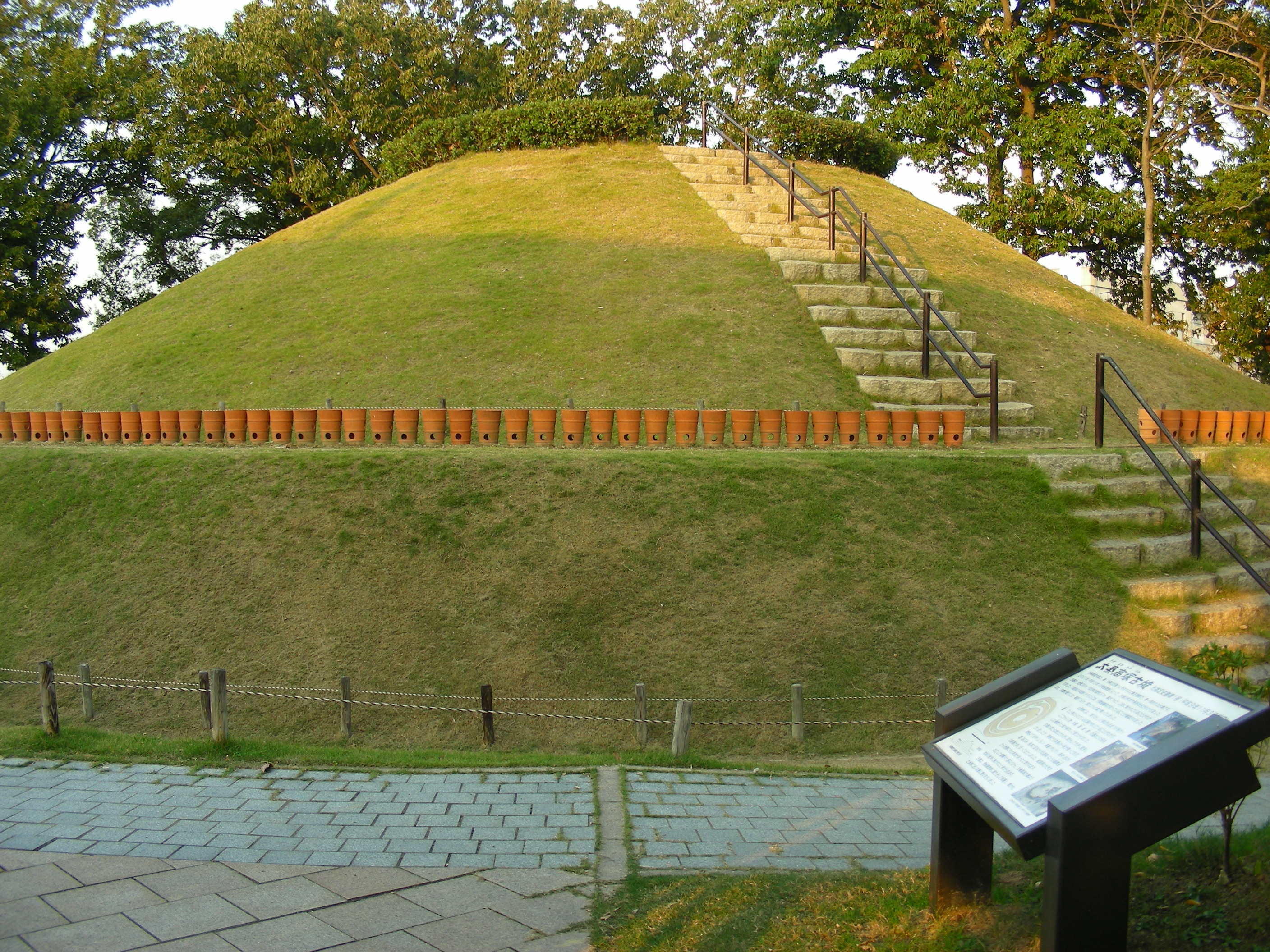 太秦高塚古墳